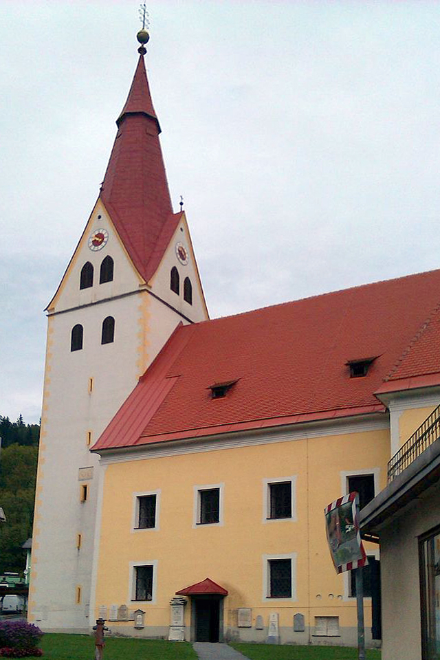 Pfarrkirche Kainach von Süden, Septebmer 2013